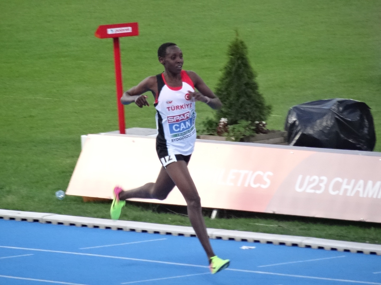 Młodzieżowe Mistrzostwa Europy w Lekkoatletyce U23 w Bydgoszczy 13-16 lipca 2017, finał biegu na 10000 m kobiet